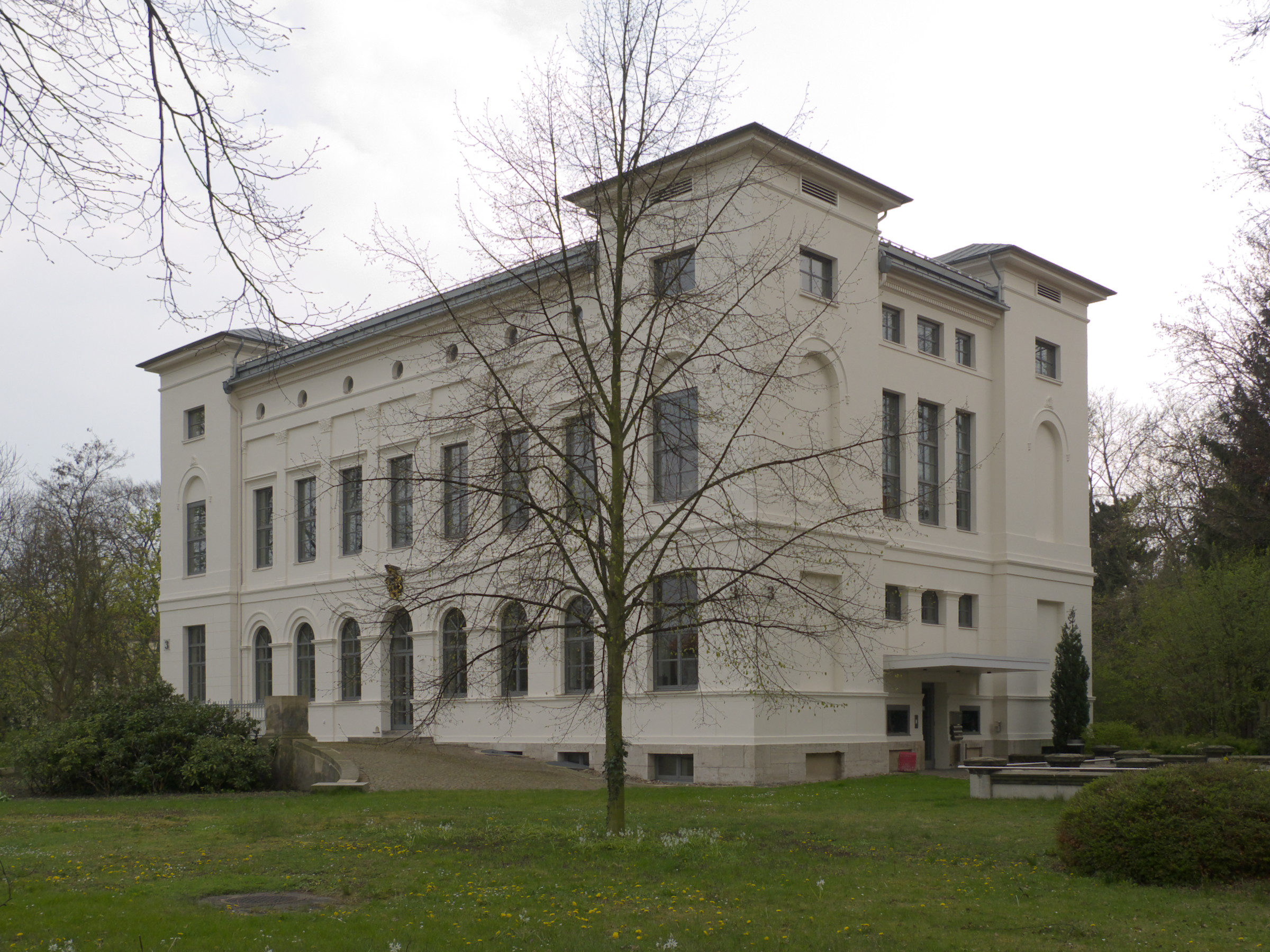 Villa von Bülow, Sitz des Georg-Eckert-Instituts für internationale Schulbuchforschung